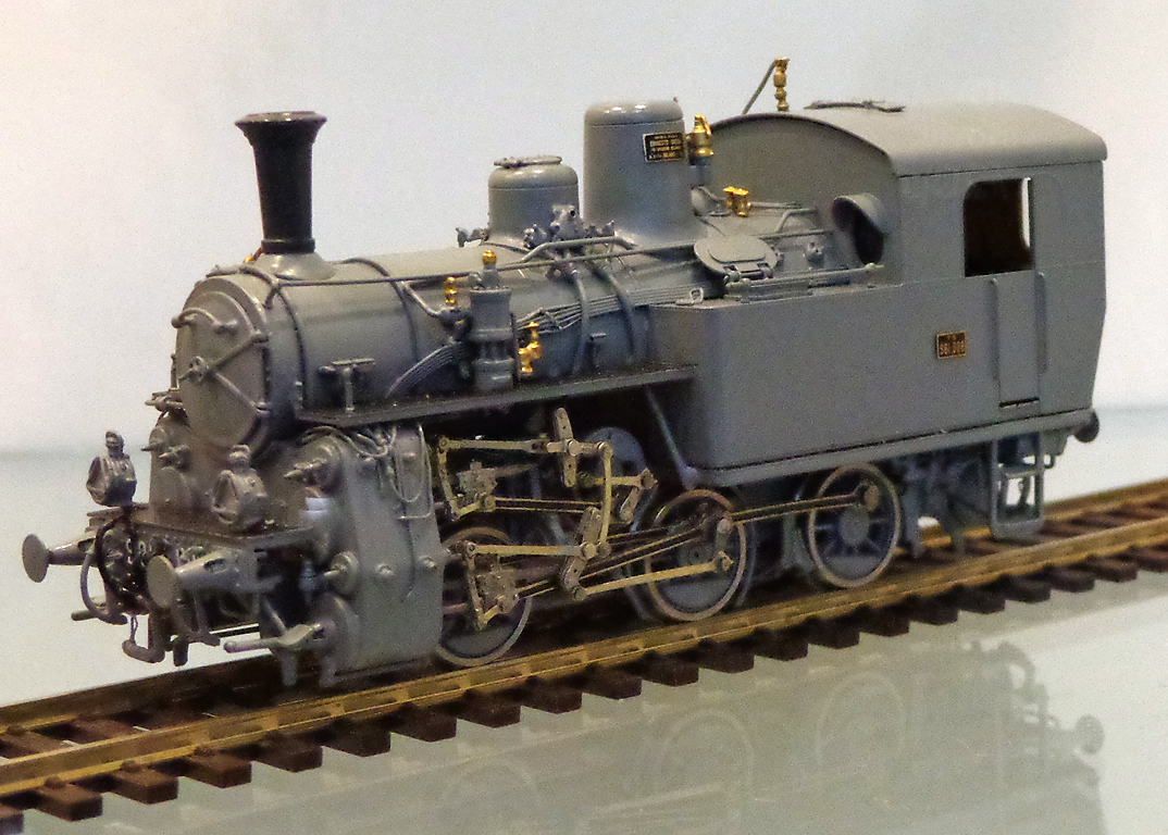 Modello in scala H0 della locomotiva a vapore gruppo 981 delle FS, realizzato da Top-Train ed esposto alla fiera Hobby Model Expo del 2012.